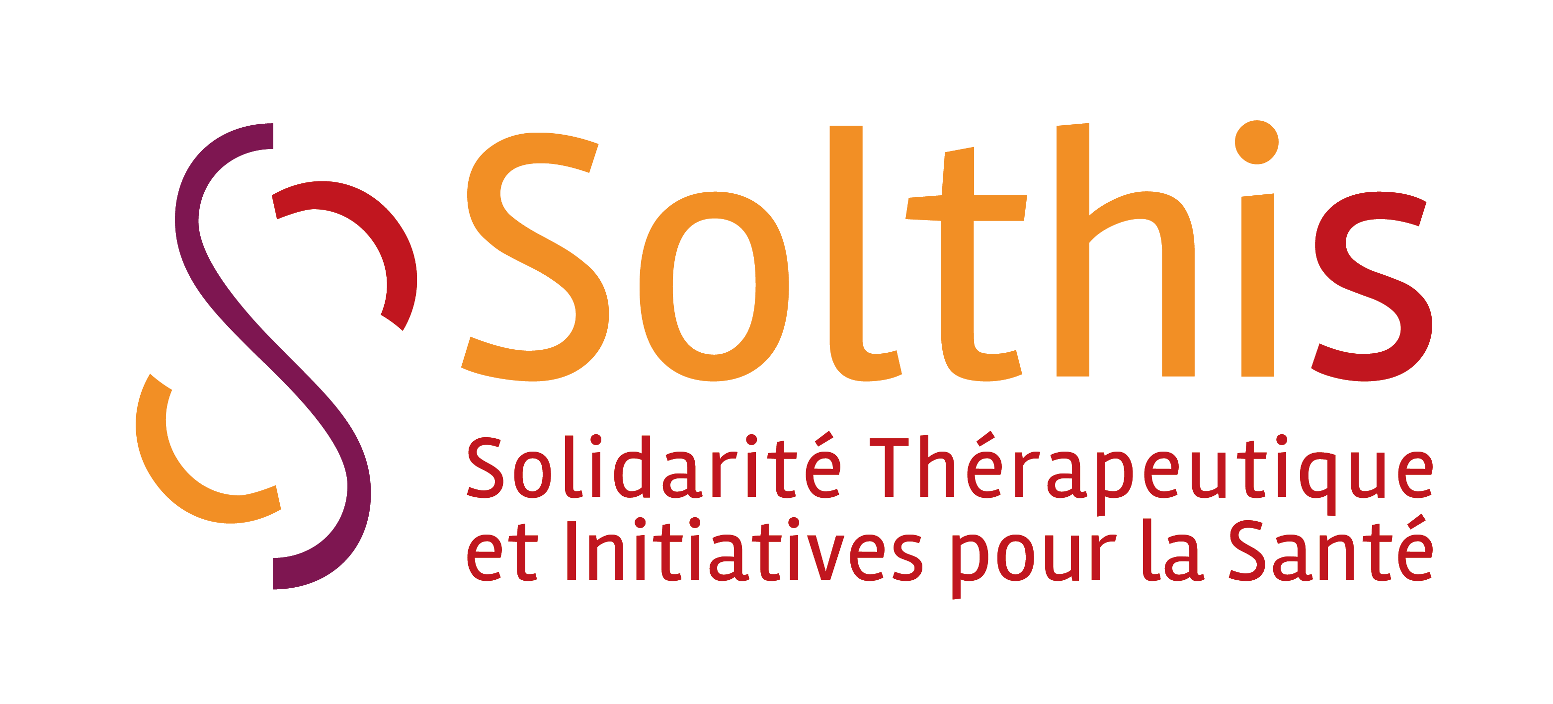 Nouveau logo de Solthis 2015